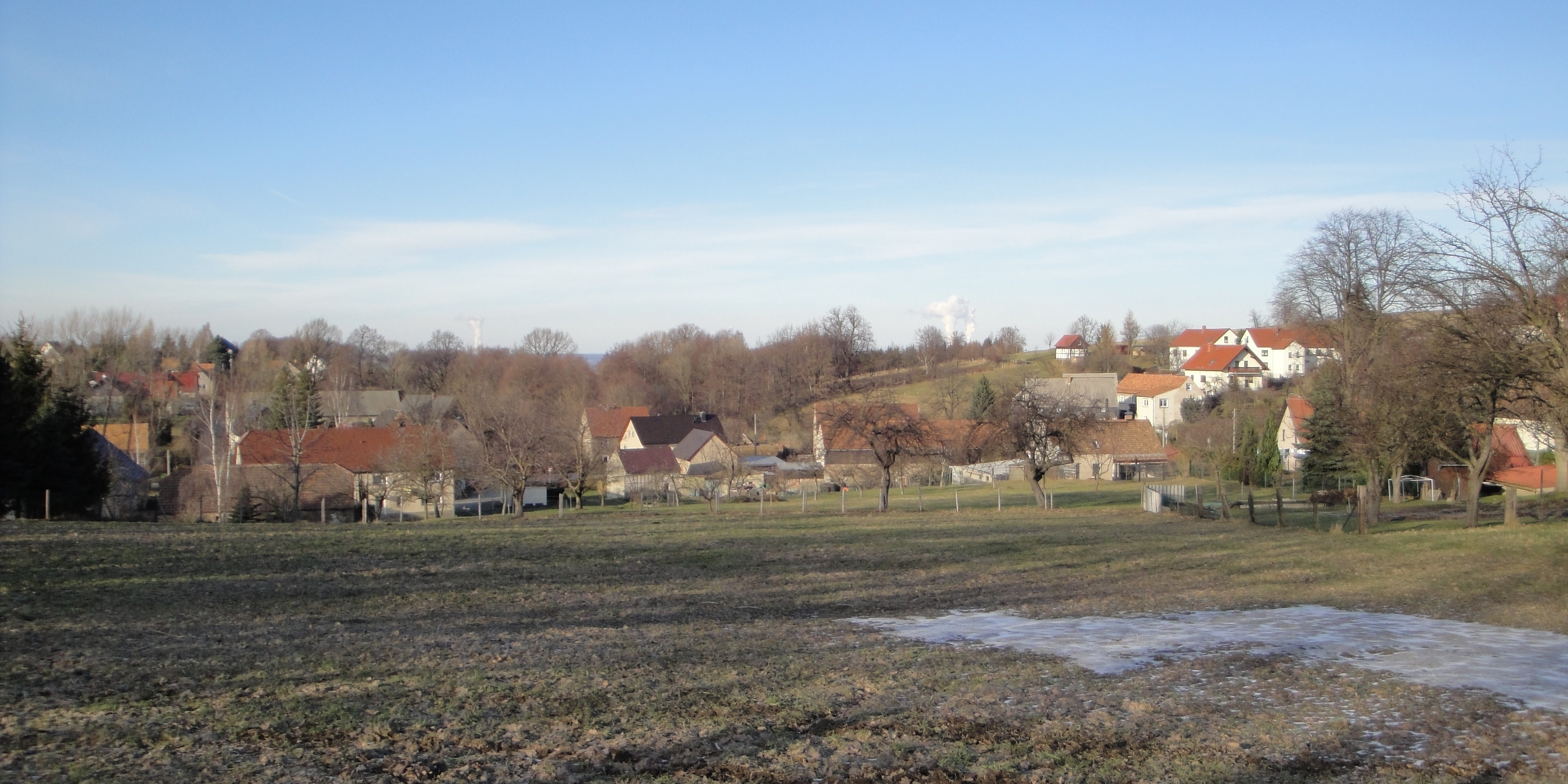 Rachlau, Gemeinde Kubschütz, Landkreis Bautzen. Hornjoserbsce: Rachlow, gmejna Kubšicy, wokrjes Budyšin.